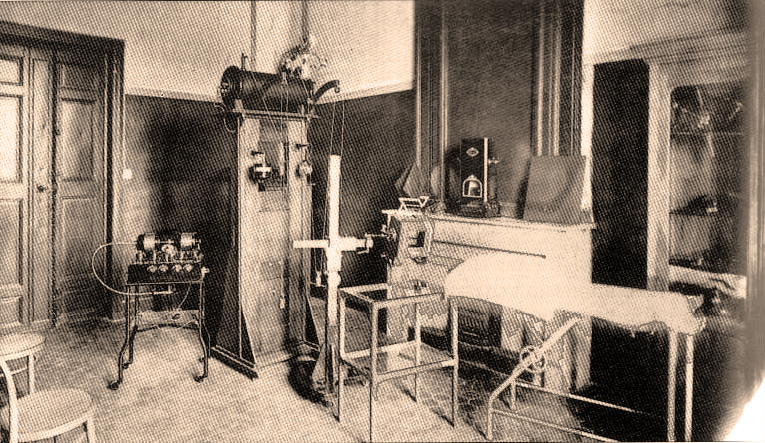 La première salle de radiographie, installée en 1900